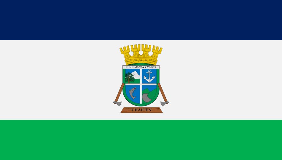 Bandera de la comuna de Chaitén (Chile)